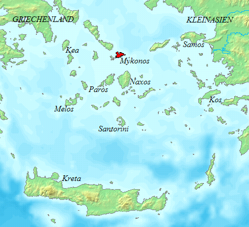 Mykonos in den Kykladen